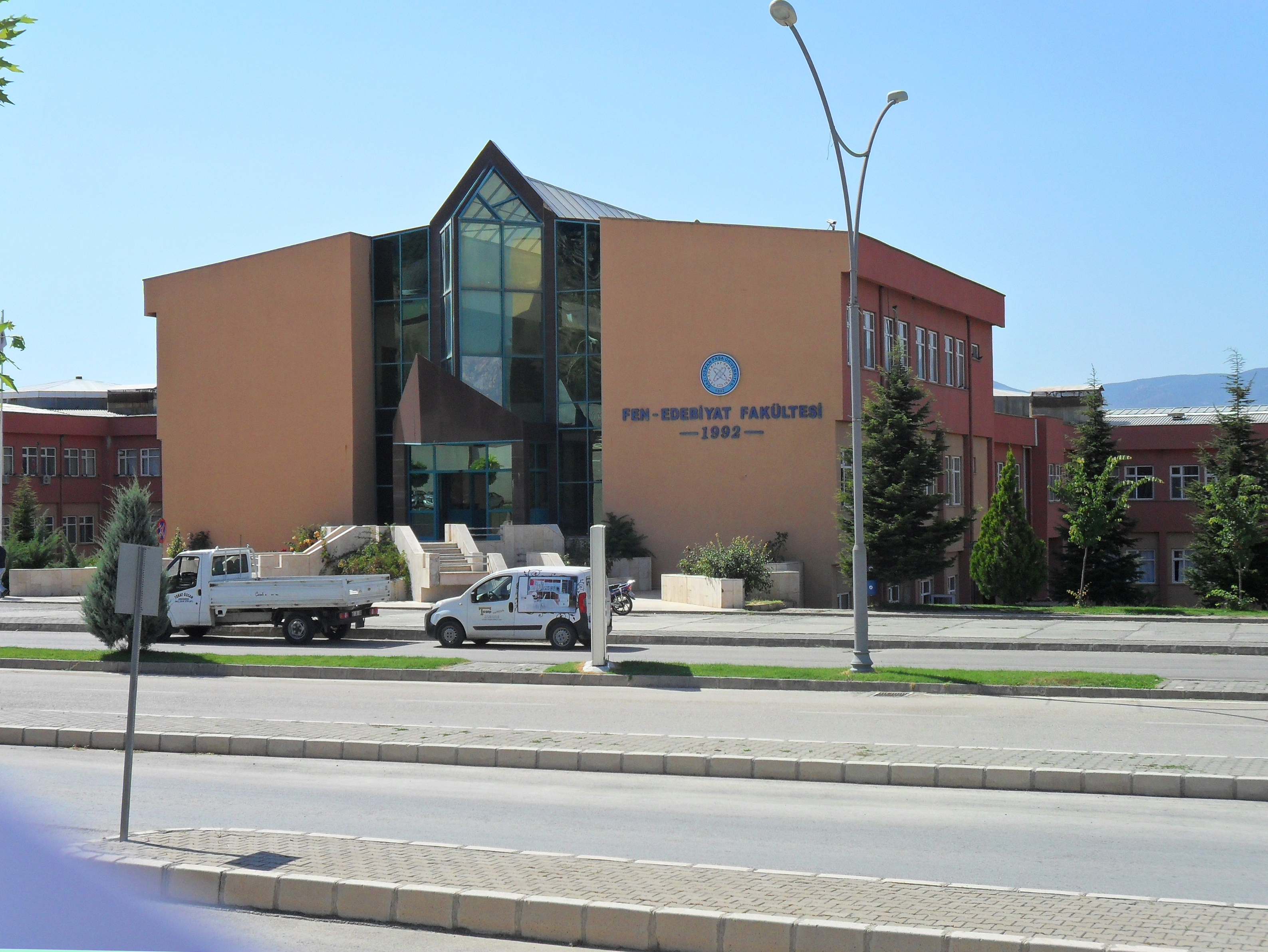 Gaziosmanpaşa Üniversitesi Fen-Edebiyat Fakültesi binası.